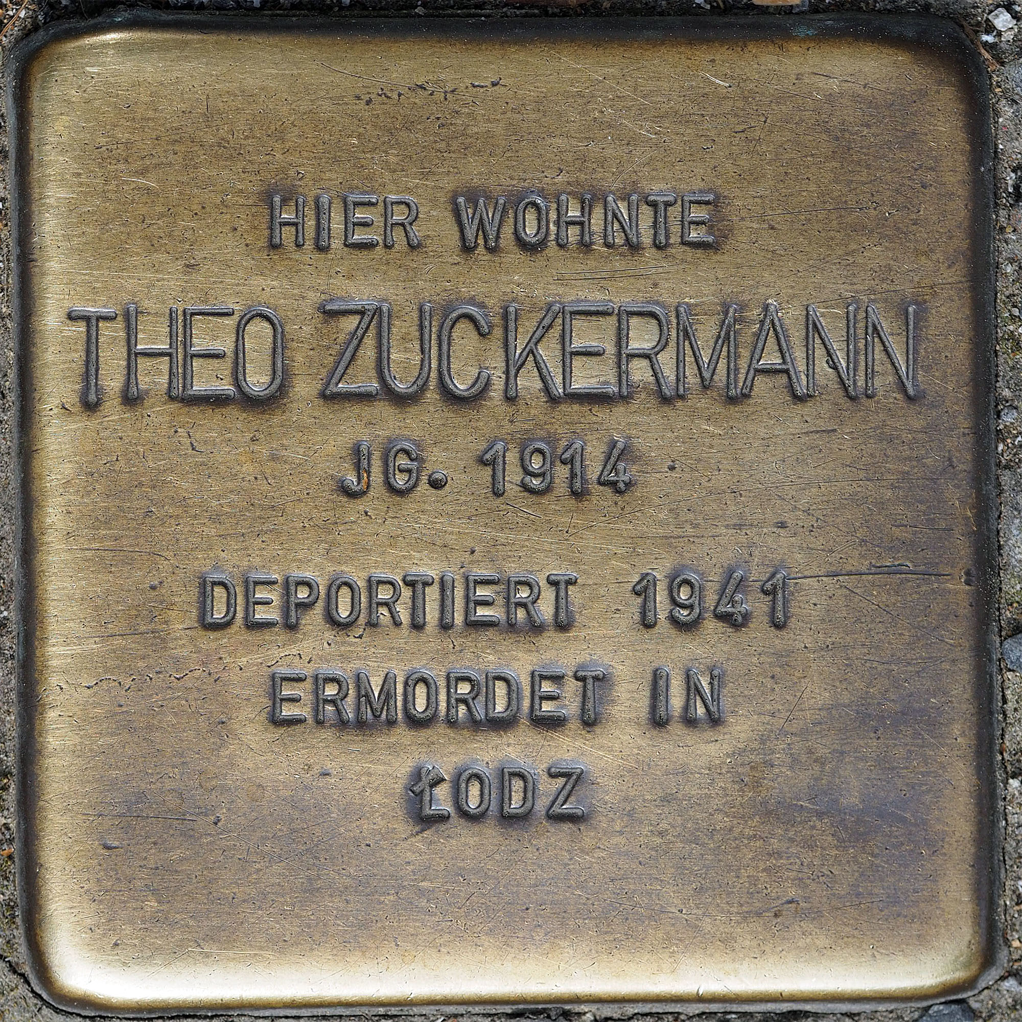 Stolpersteine MG: Zuckermann, Theo